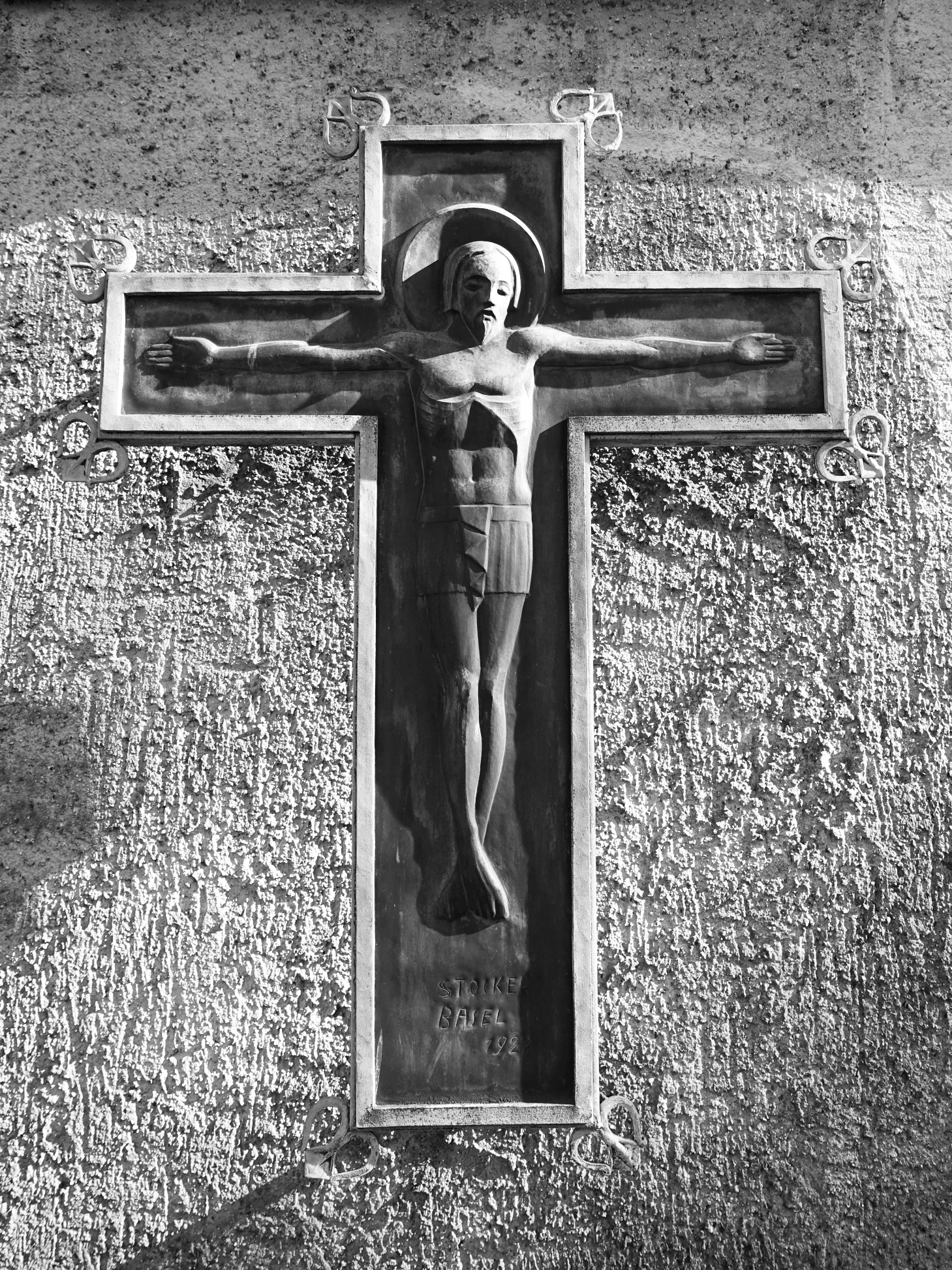 Hans Stocker (1896-1983) Maler. Sein Grabkreuz auf dem Friedhof Wolfgottesacker, Basel